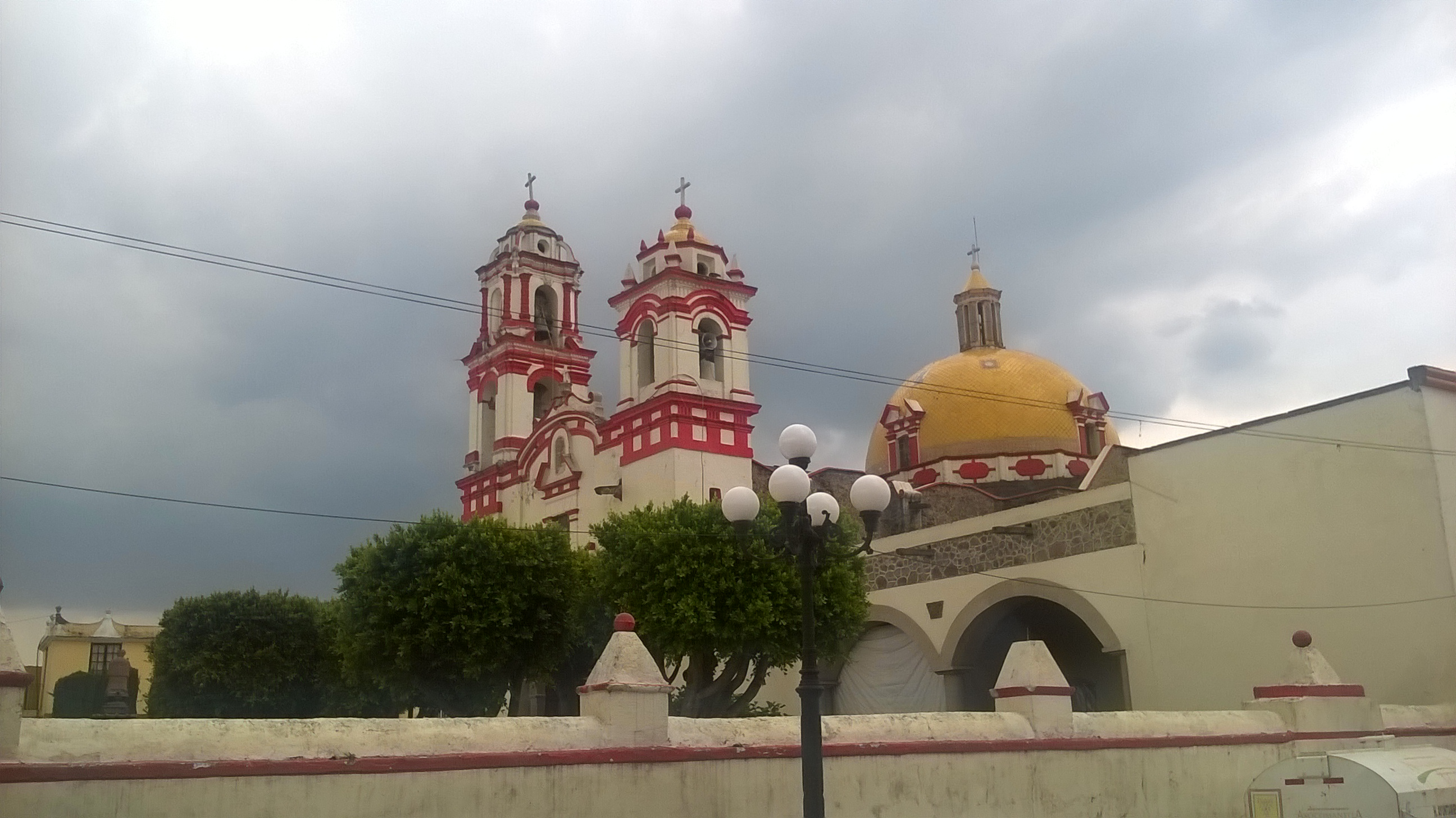 Centro Axocomanitla, Tlaxcala